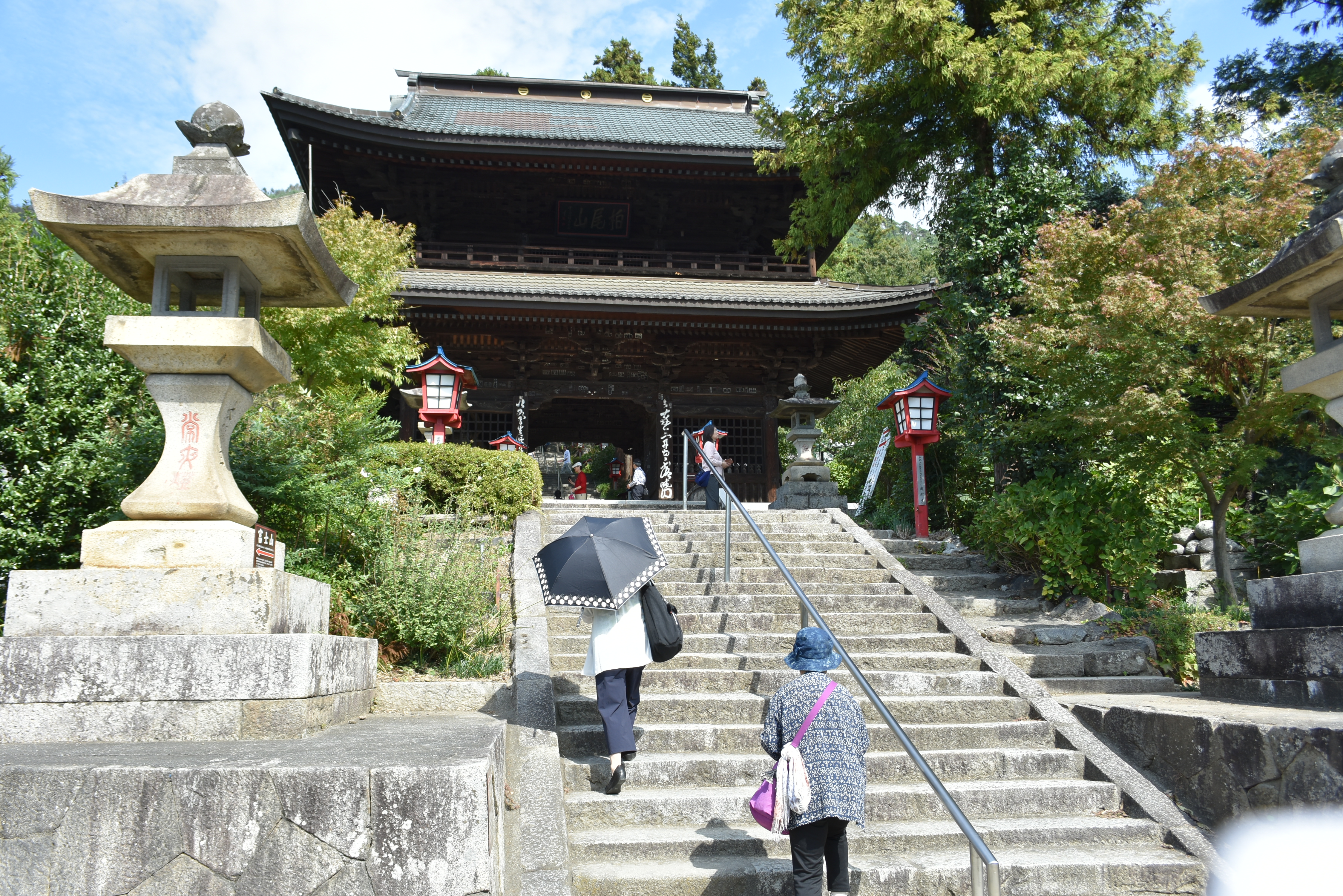 勝沼 大善寺